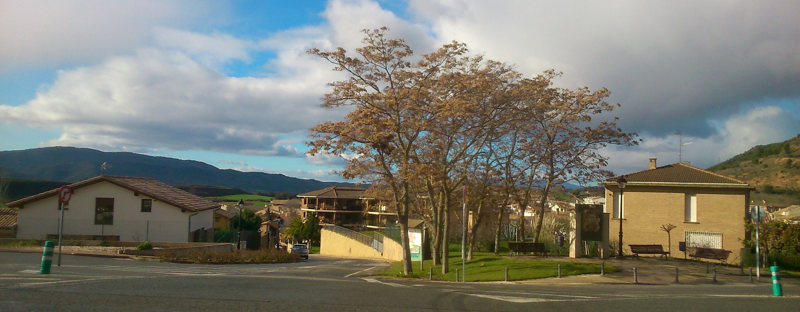 Mañeru, Navarra